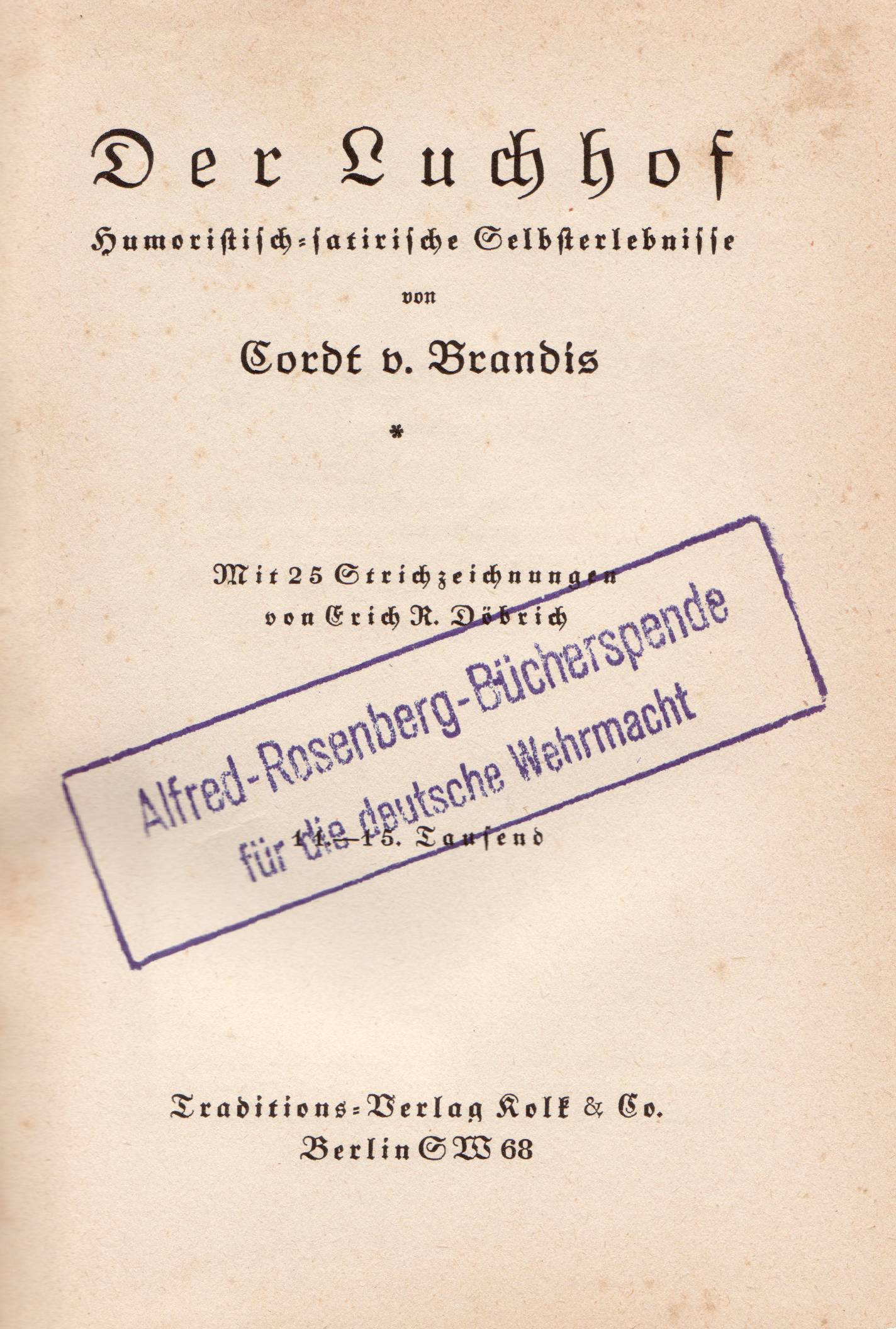 Titelblatt: Der Luchhof Humoristisch-satirische Selbsterlebnisse von Cordt v. Brandis Mit 25 Strichzeichnungen von Erich R. Döbrich 11.-15. Tausend Traditions-Verlag Kolk & Co Berlin SW 68 [Alfred-Rosenberg-Bücherspende für die deutsche Wehrmacht].